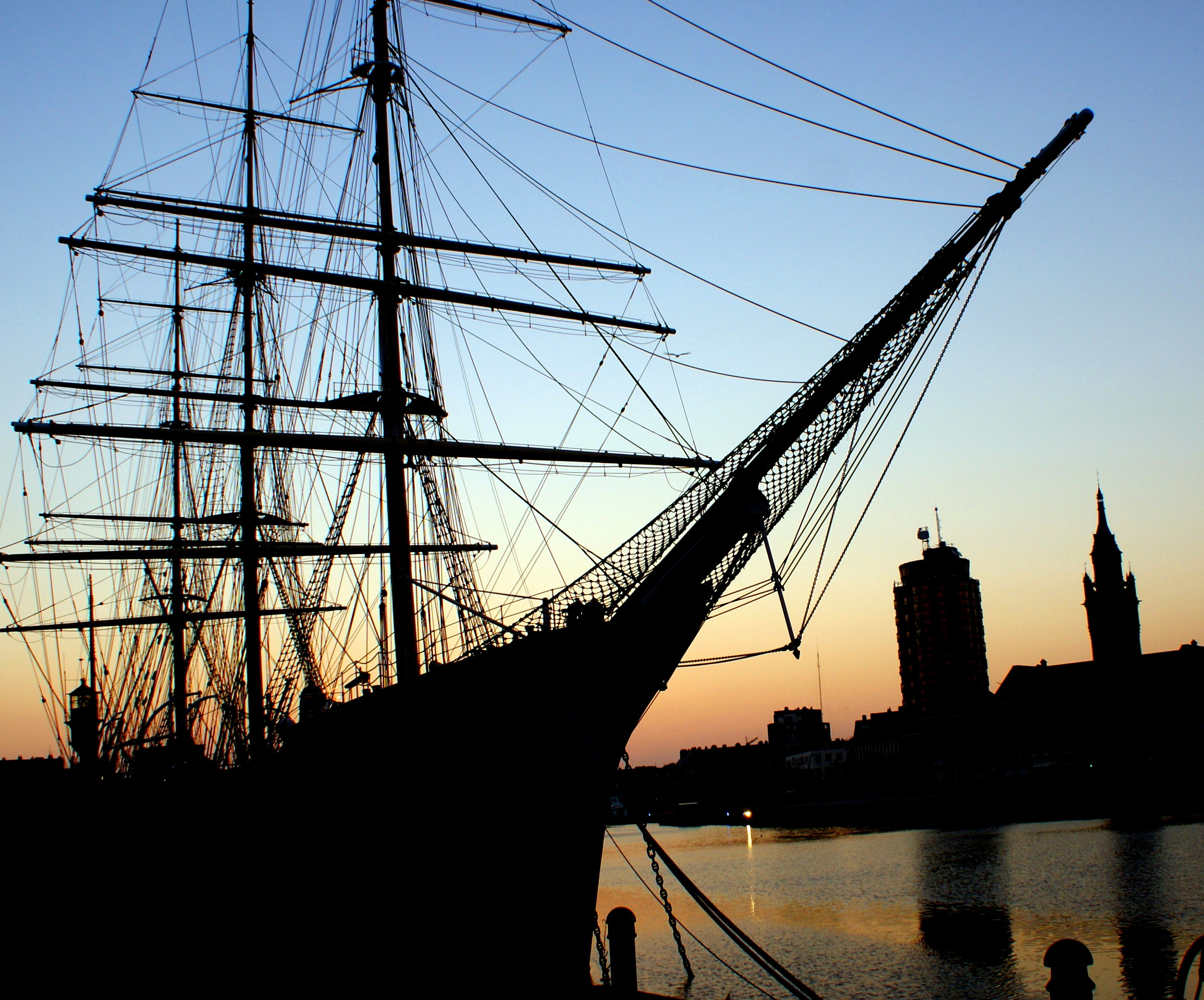 Nuit américaine, trois-mâts carré Duchesse Anne (Musée portuaire de Dunkerque, Nord, France).